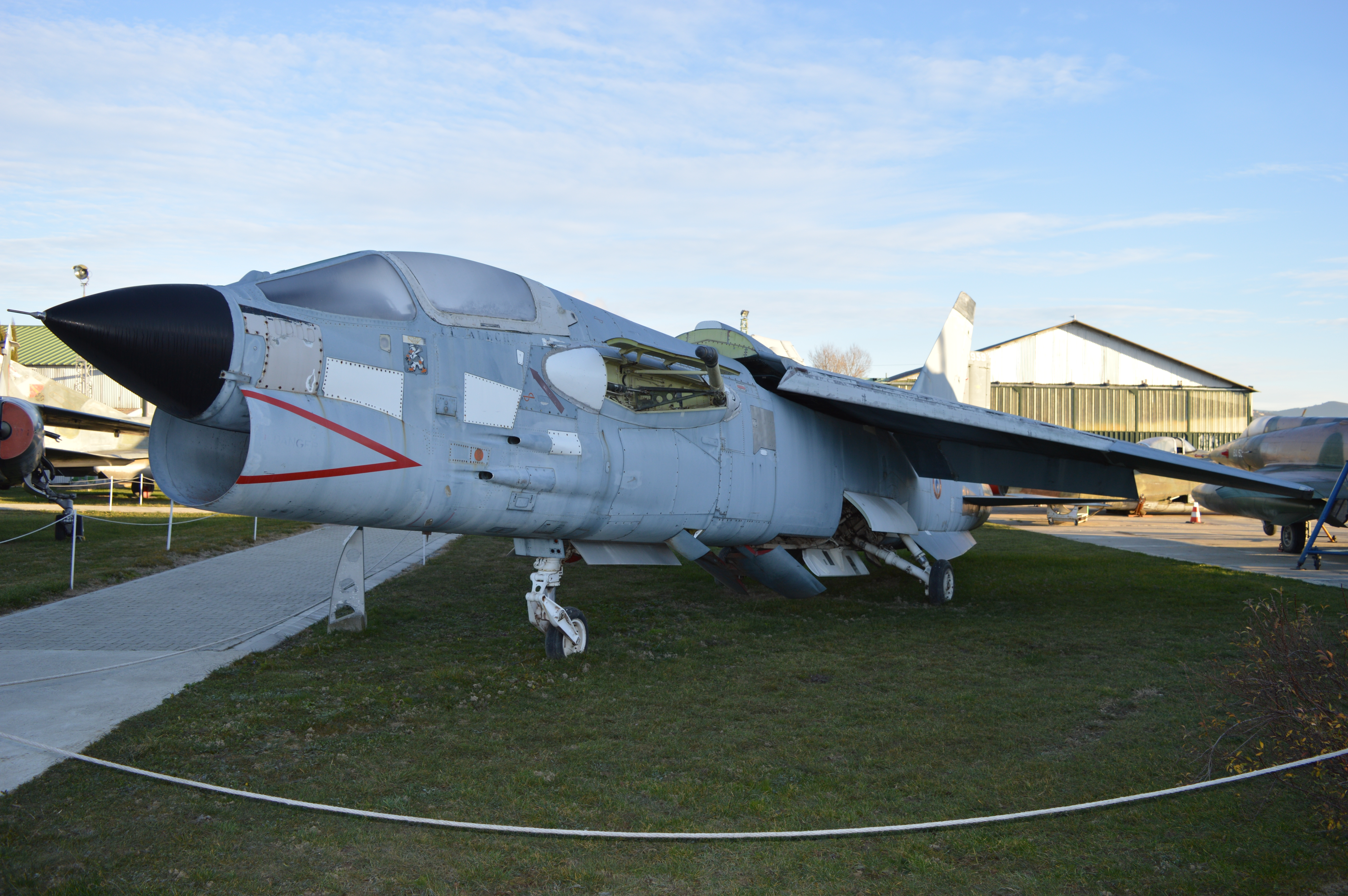 F8 CRUSADER MEAC